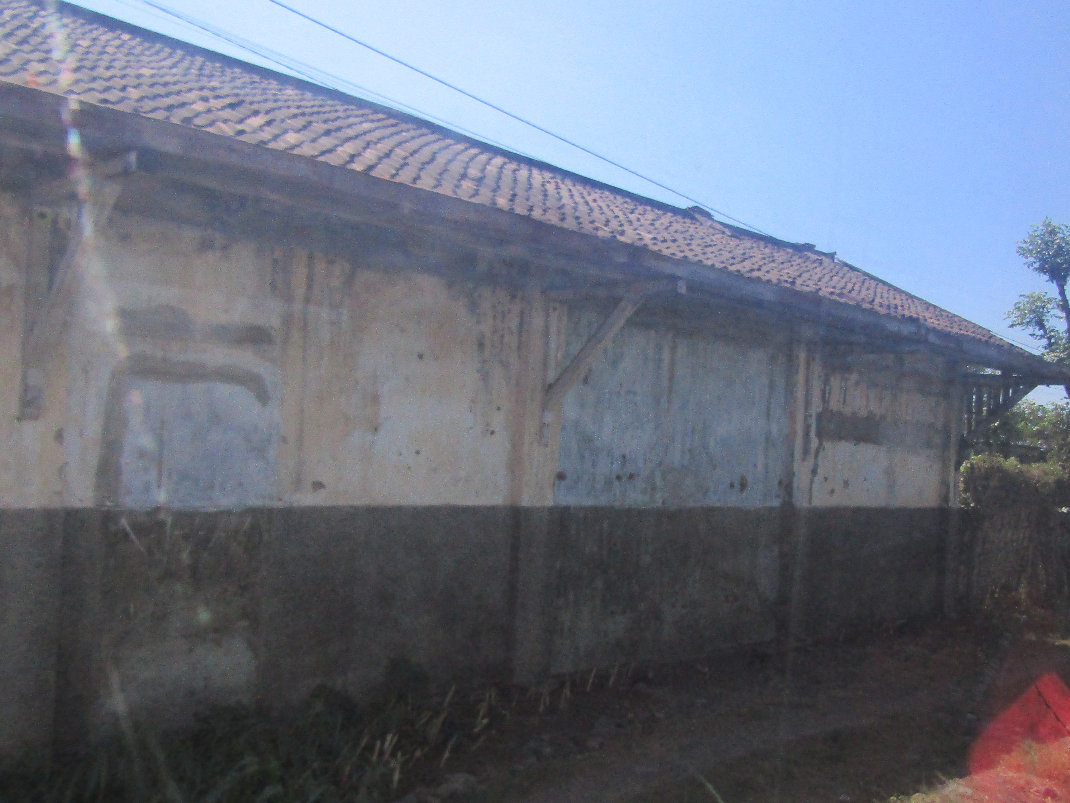 Stasiun nonaktif Nguling, terletak di Desa Watestani, Kecamatan Nguling, Kabupaten Pasuruan.